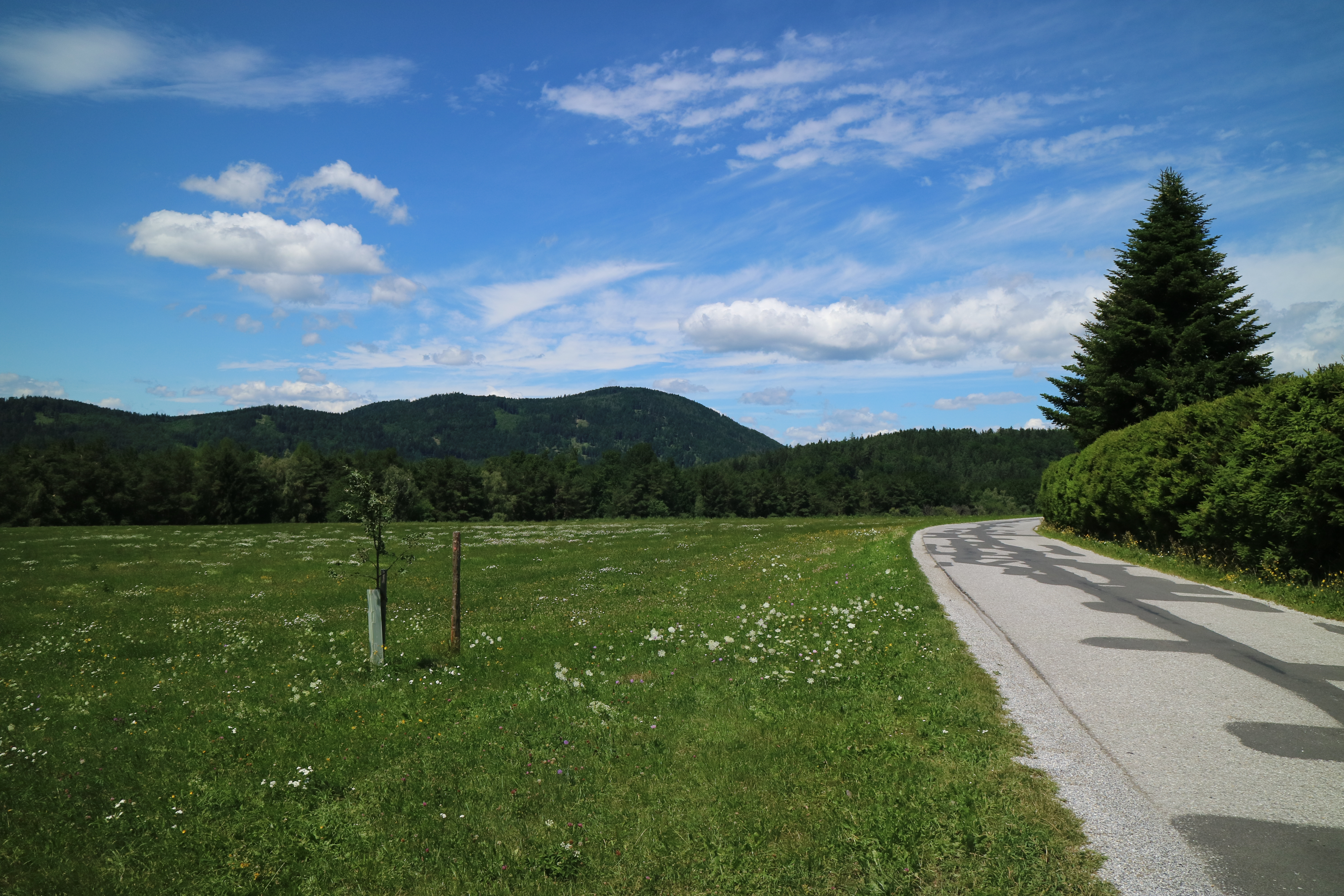 Blick von Kalkleiten zur Hohen Rannach